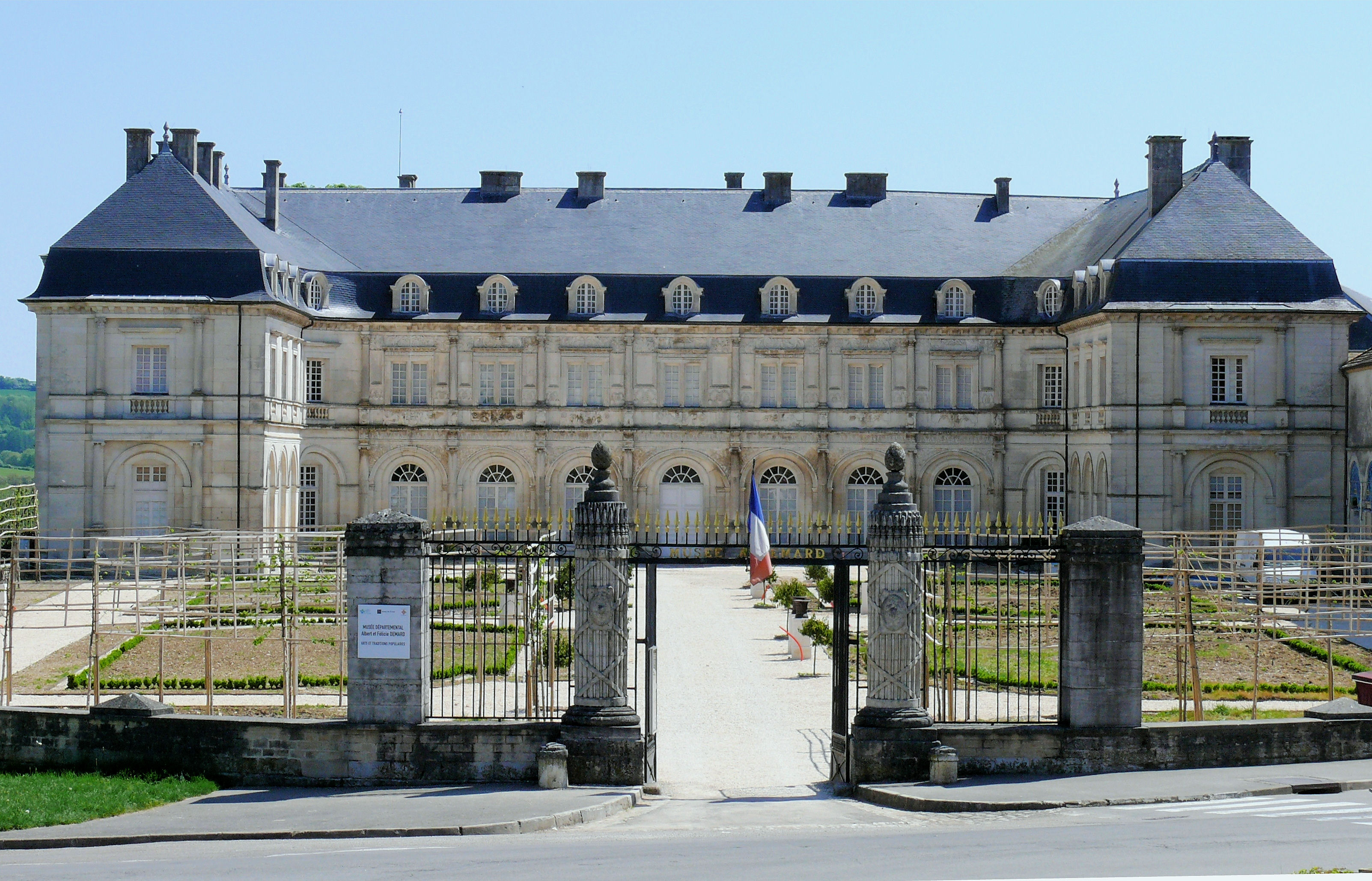 Champlitte - Musée